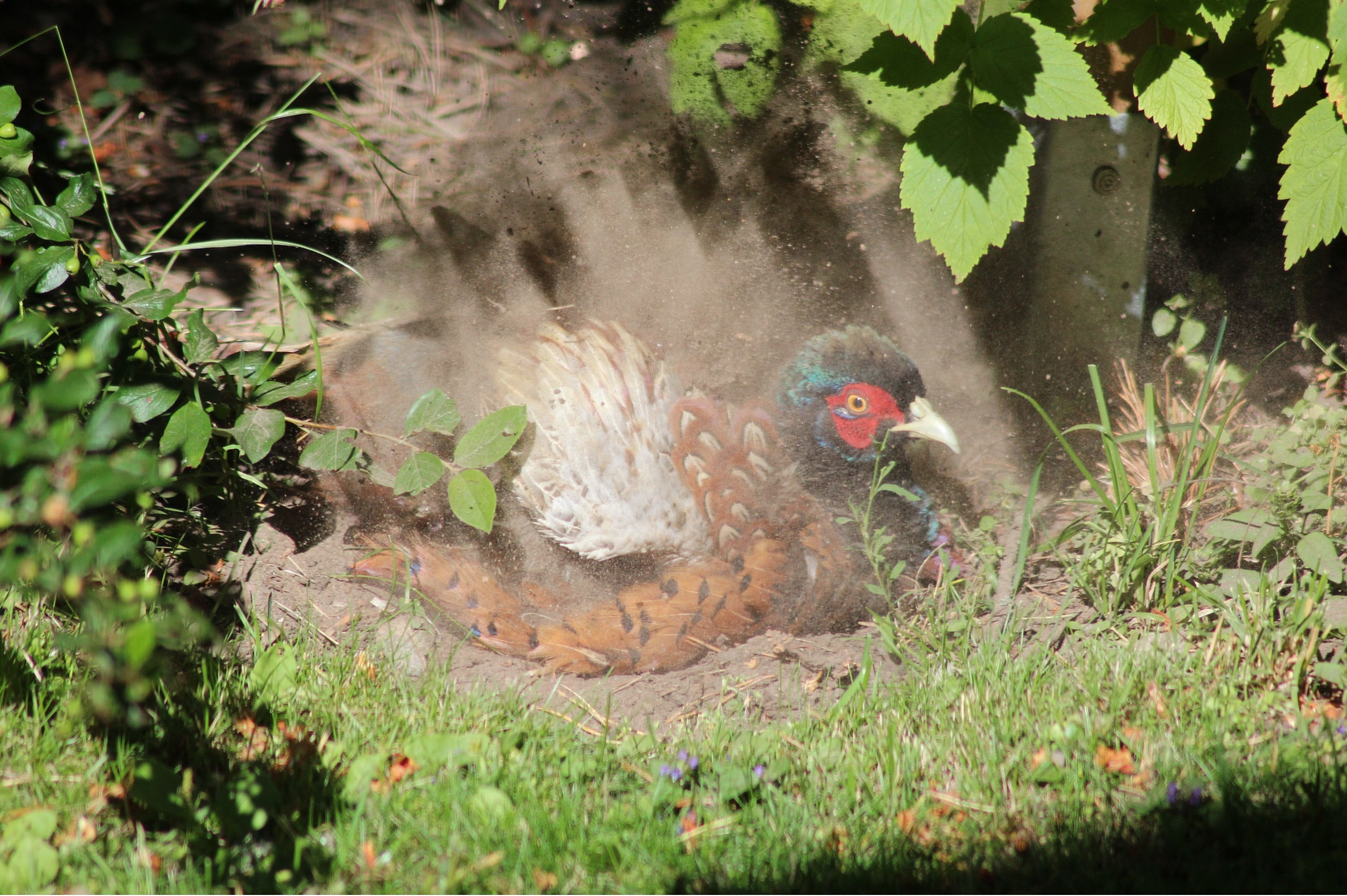 Fasaani ottaa hiekkakylvyn.